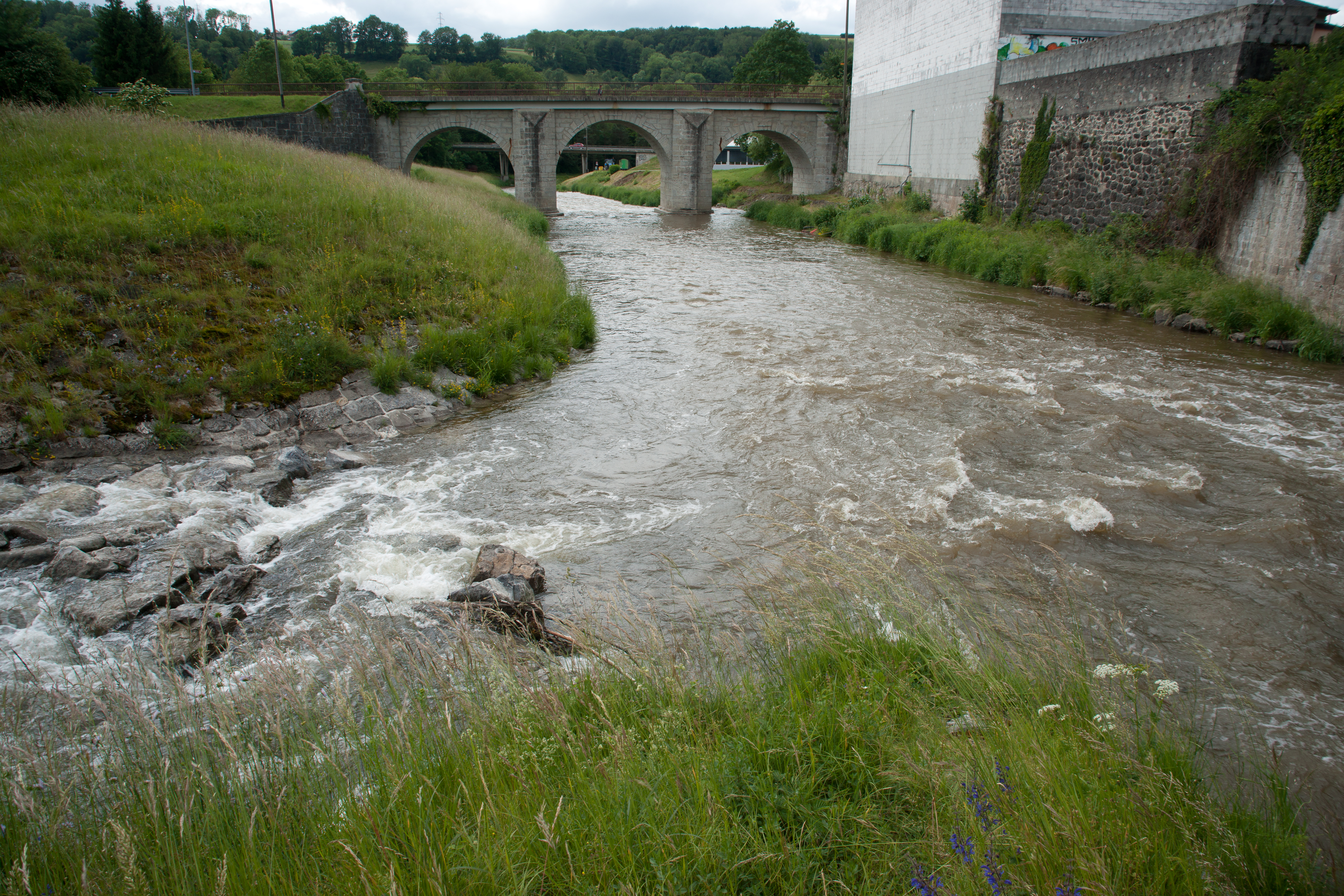 Confluence Carrouge - Broye peu après la confluence Bressonnaz - Carrouge